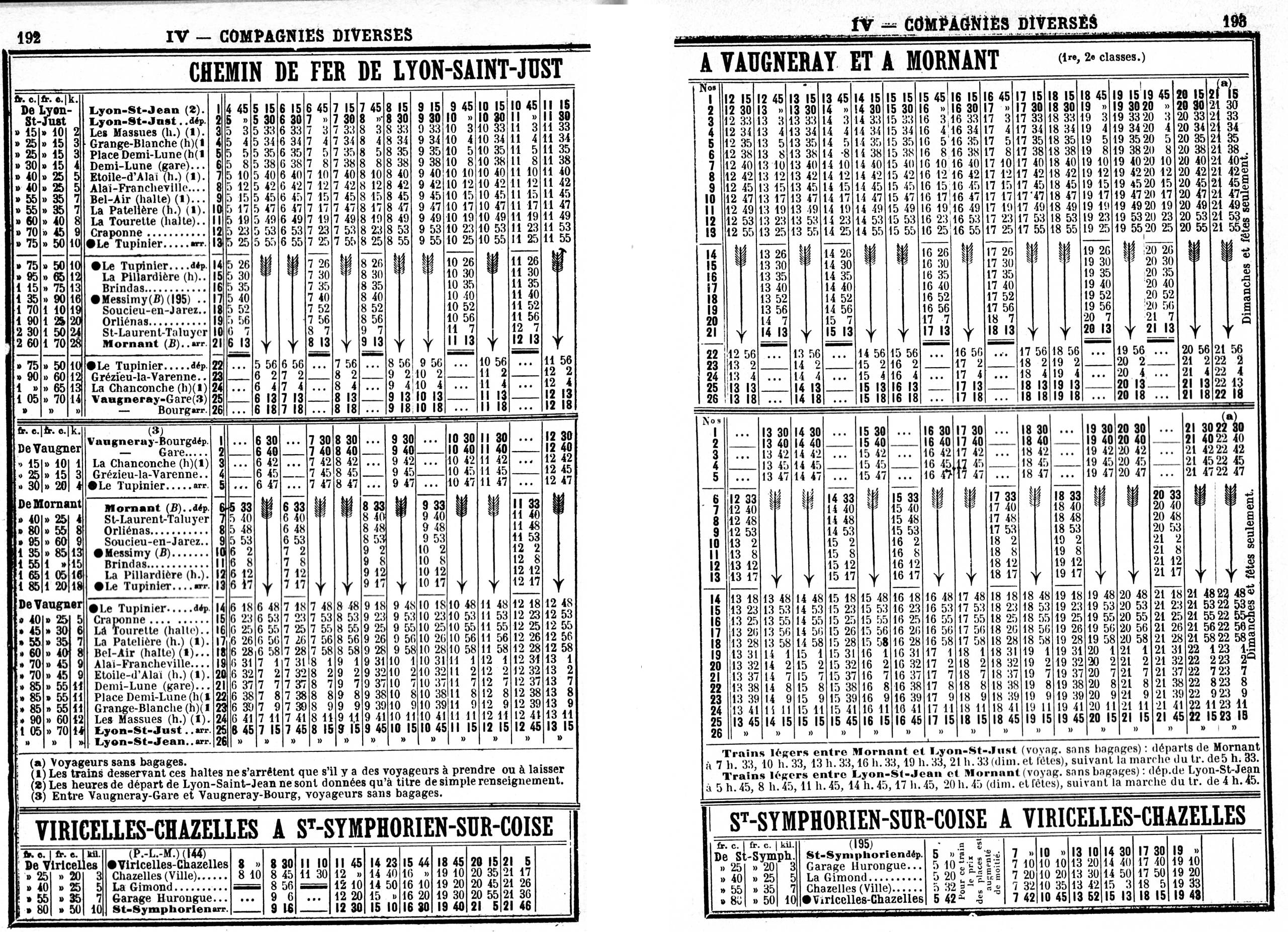 Horaires du Chemin de fer de Lyon-Saint-Just à Vaugneray et Mornant de mai 1914, publiés par l'Indicateur Chaix